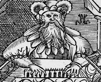 Detail aus: Philipp Melanchthon: Unterricht der Visitatorn, an die Pfarherrn in Hertzog Heinrichs zu Sachsen Fürstenthum, Gleicher form der Visitation im Kurfürstenthum gestellet, Holzschnitt-Bordüre von Lucas Cranach d. J., Wittenberg 1539